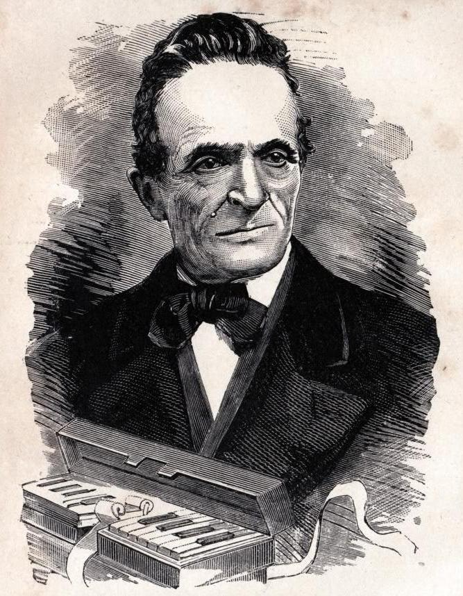 L'inventore Antonio Michela Zucco. Xilografia tratta da Luigi Stefanoni, "Storia d'Italia contemporanea", Ed. E. Pierino, Roma, 1885